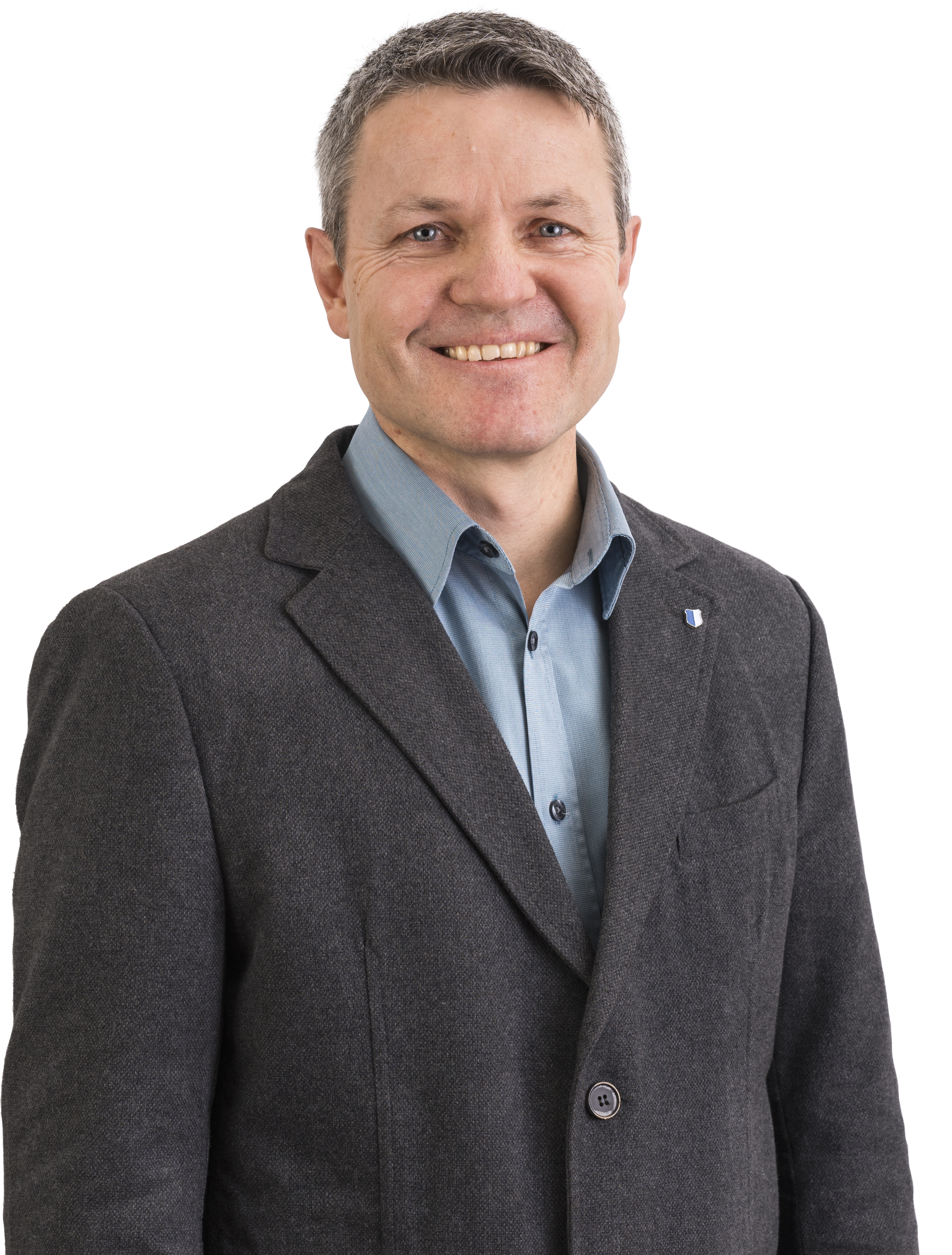 Portrait von Roger Zurbriggen